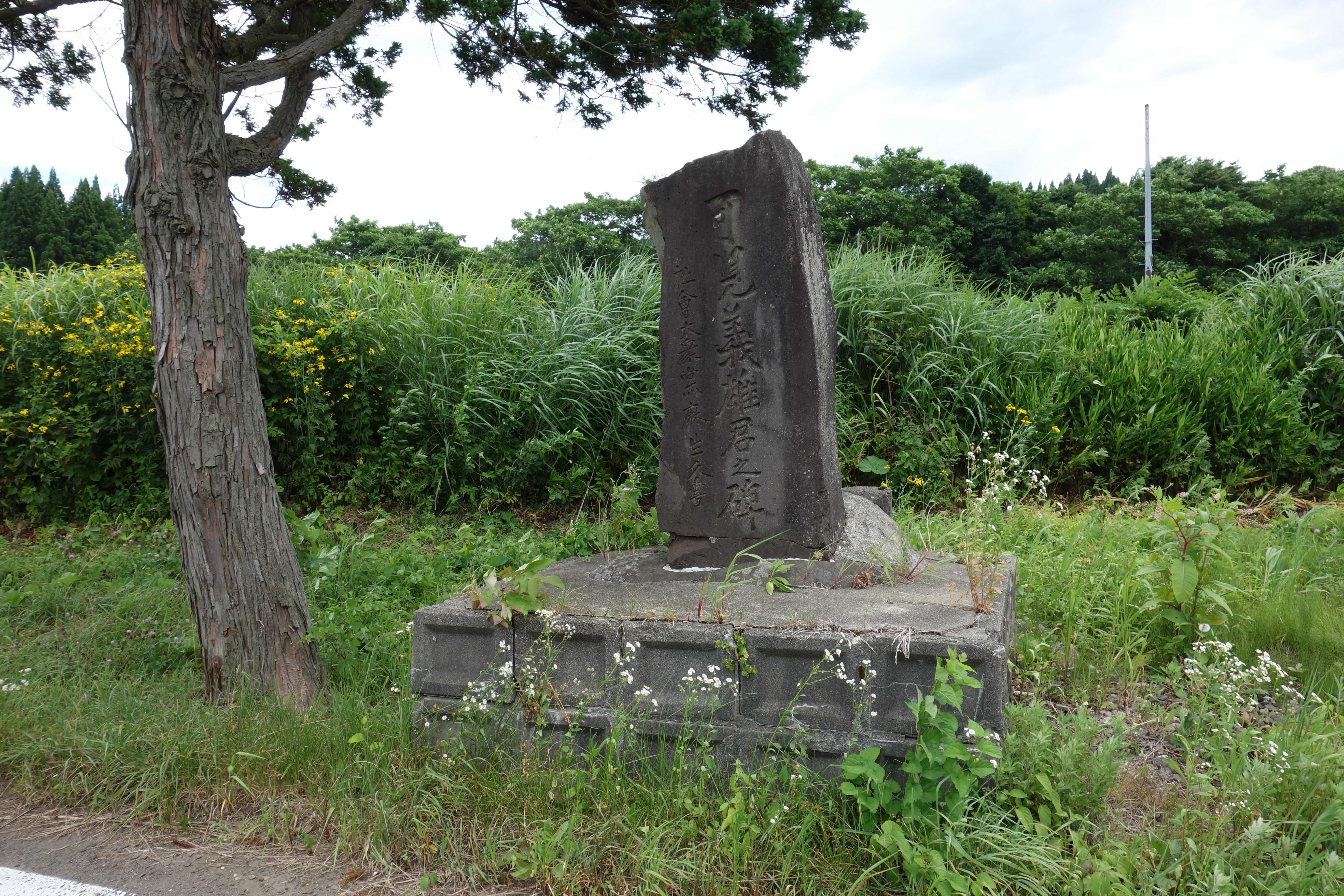 可児義雄君の碑 北秋田市五味堀